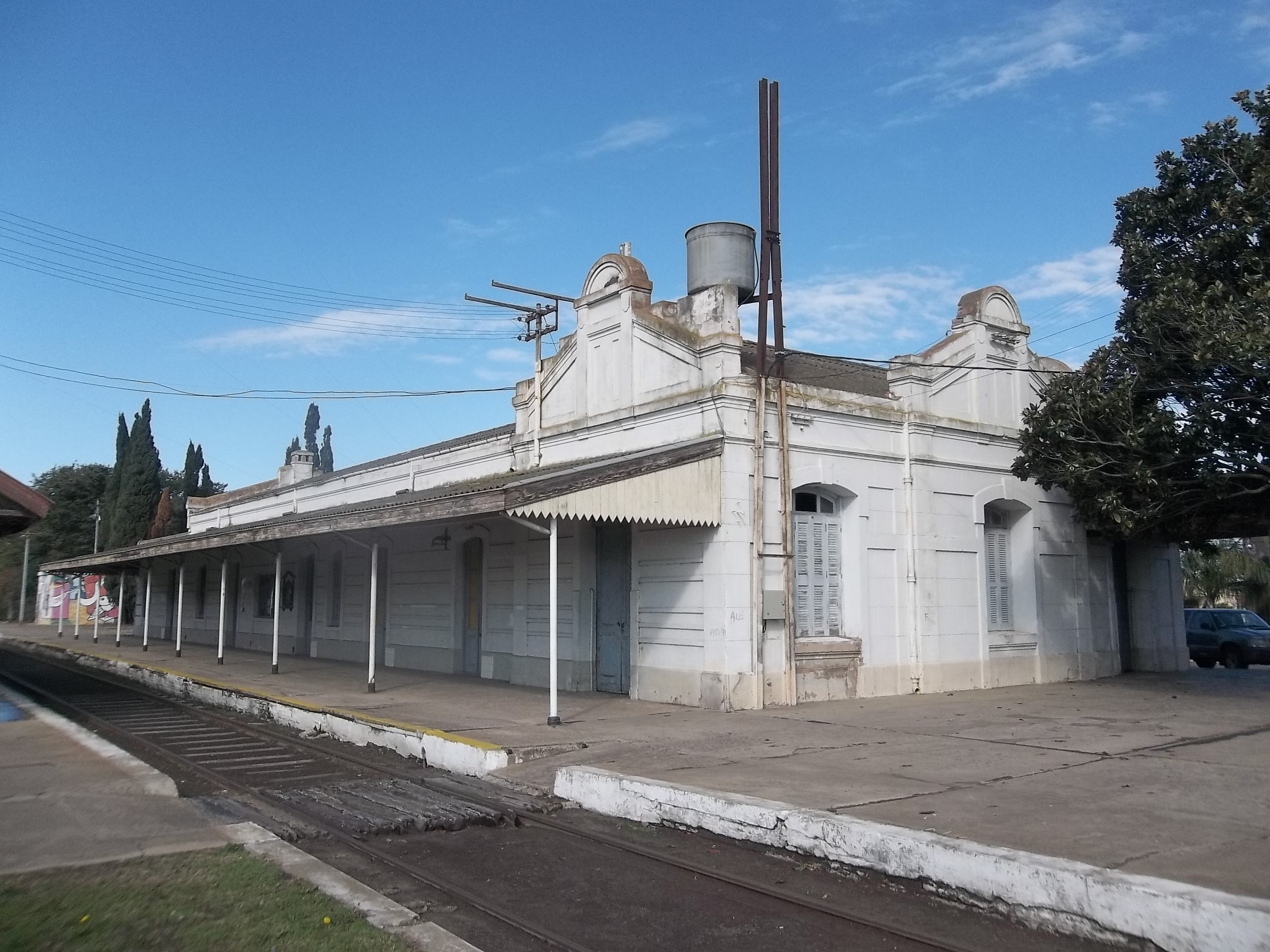 Estación Lincoln, ubicada en la ciudad de Lincoln, partido homónimo, Provincia de Buenos Aires, República Argentina